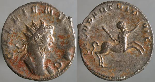 Antoninian des Gallienus aus Billon, geprägt in Mediolanum mit der Inschrift GALLIENVS AVG (Gallienus Augustus) und einem Zentauren, dem Legionssymbol der Legio II Parthica.